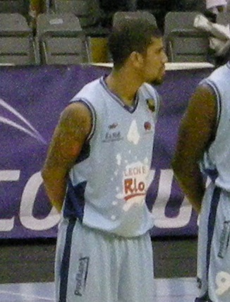 Fotografía de James Feldeine co Breogán no Pazo dos Deportes.